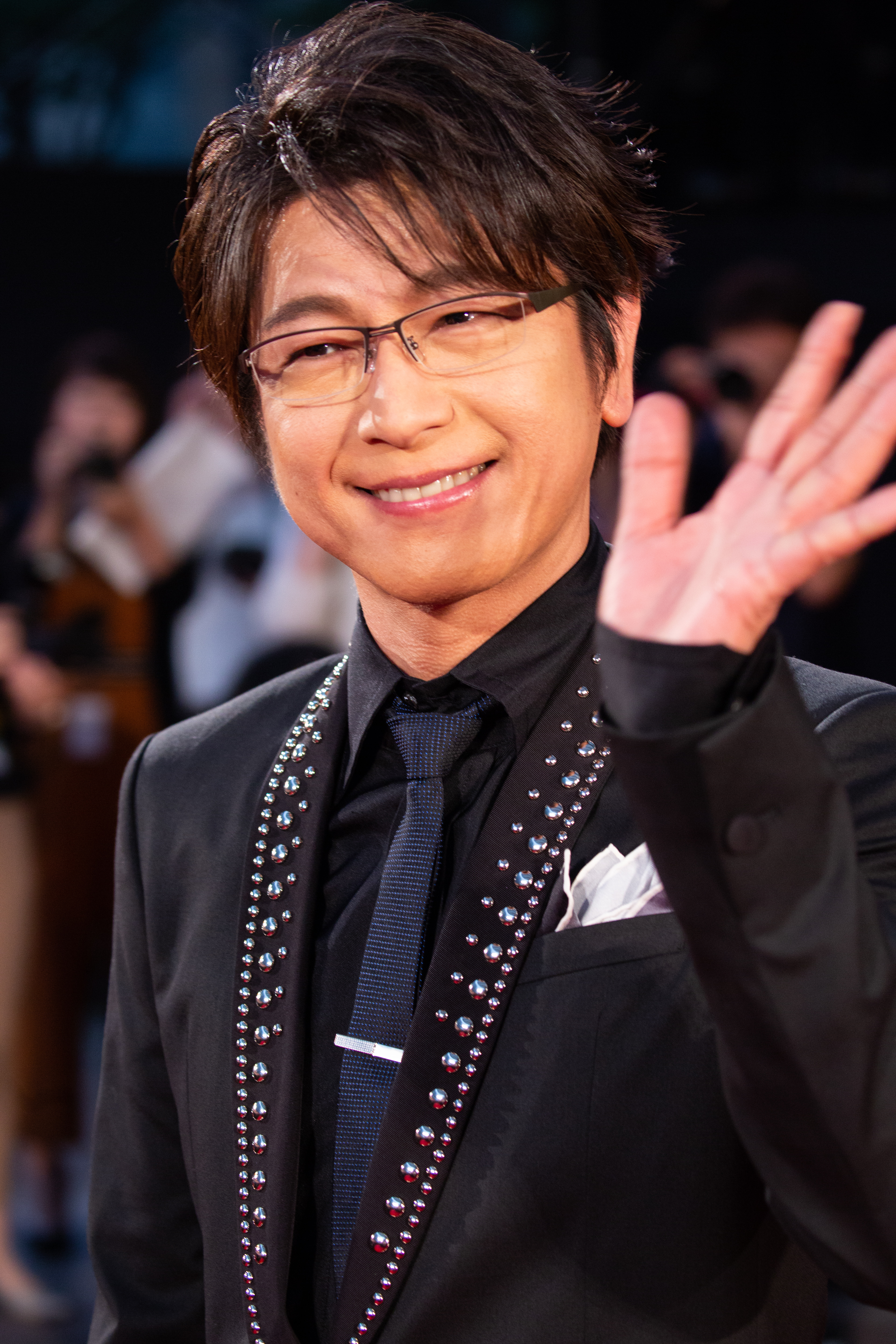 ハン・ソロ/スター・ウォーズ・ストーリー ジャパン・プレミア レッドカーペット 及川光博